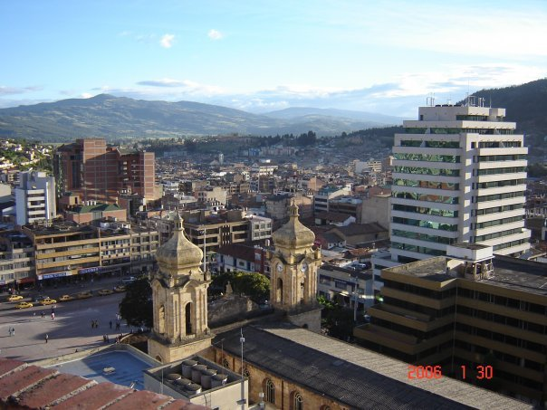 Duitama